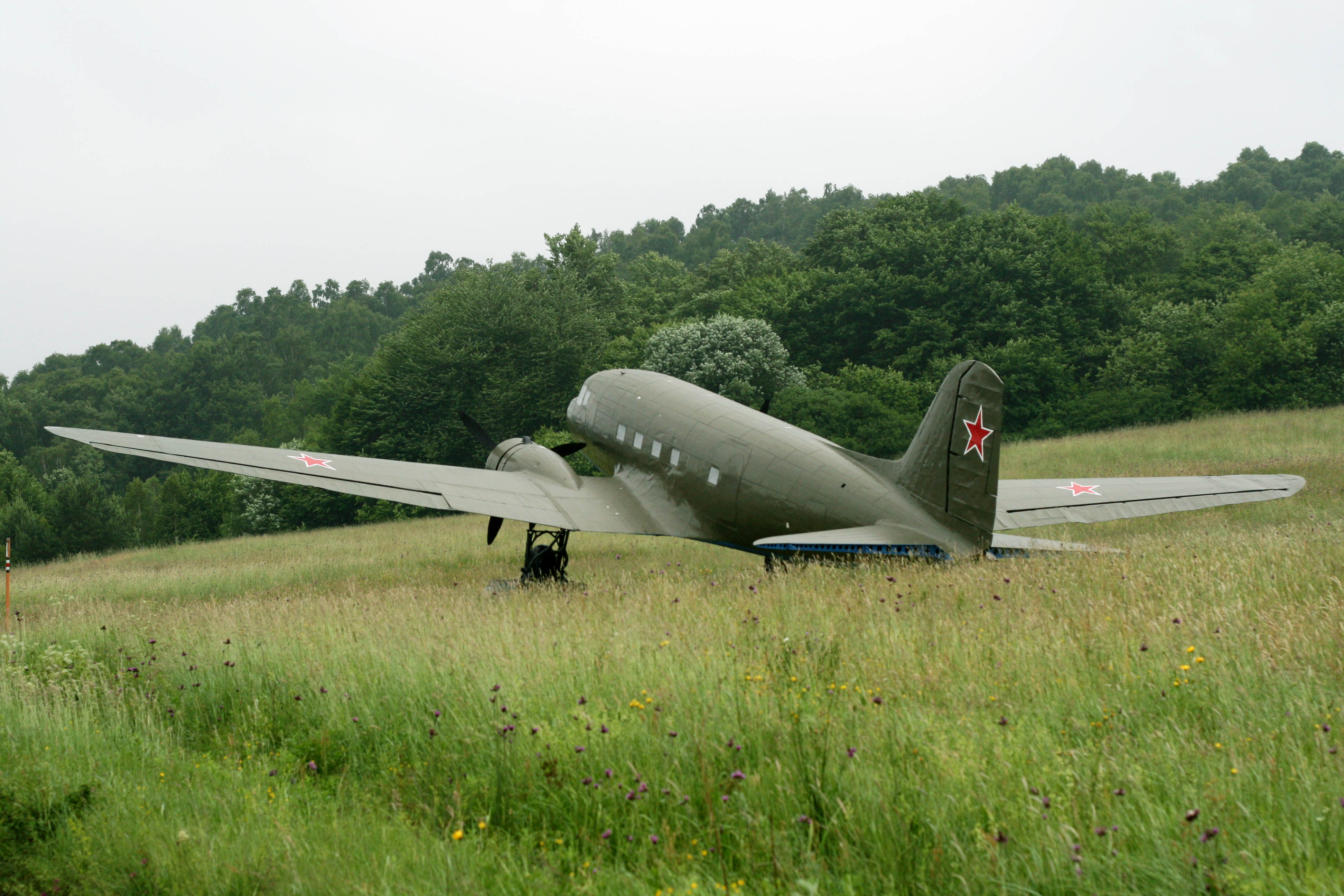 V chotári obce Vyšný Komárnik sa nachádza vojenský exponát z druhej svetovej vojny sovietske lietadlo, ktoré v čase KDO poskytovalo materiálnu pomoc bojujúcim jednotkám